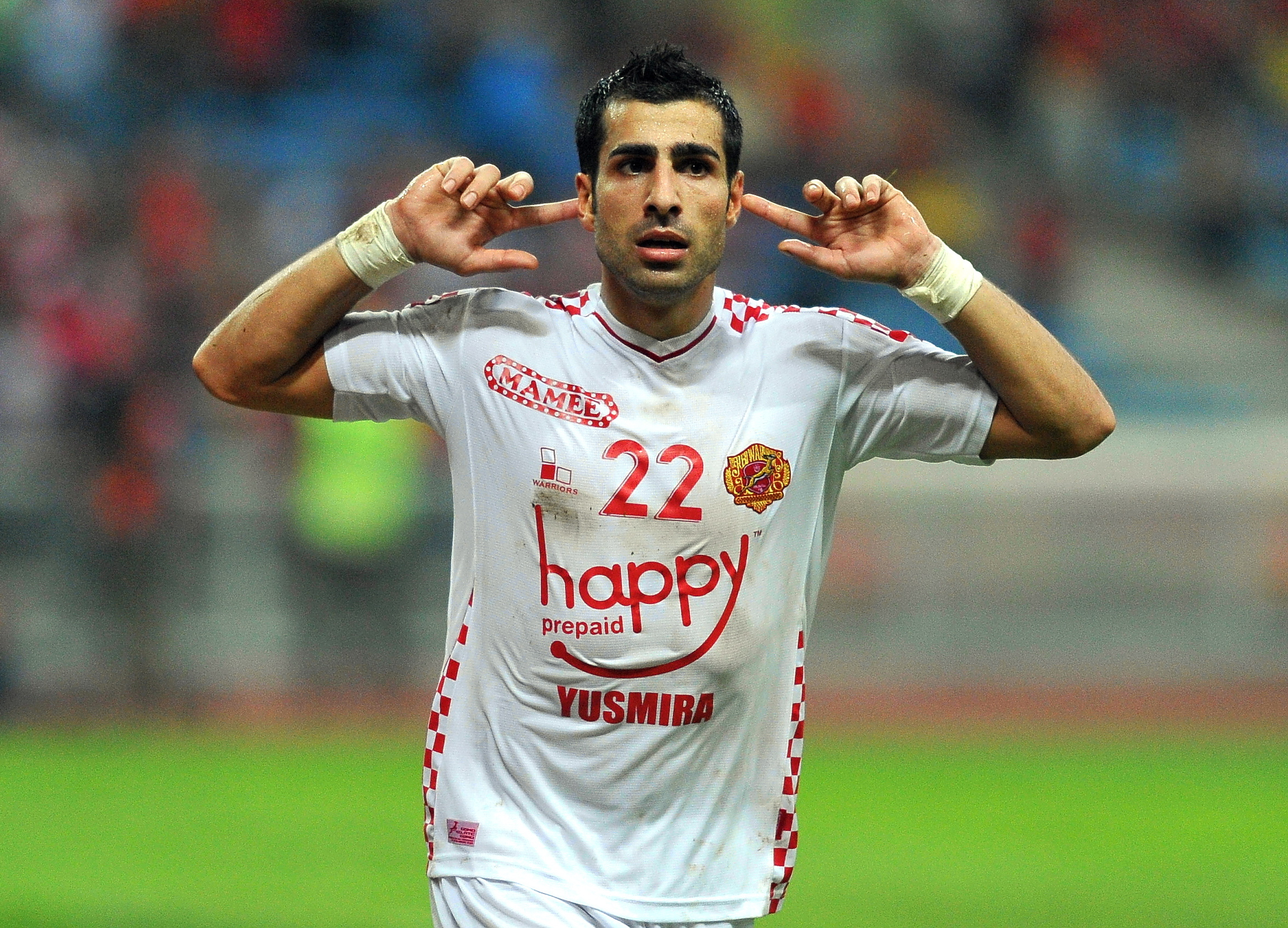 Mohammed Ghaddar - Malaysia Cup 2012 semi-finals Kelantan VS Selangor